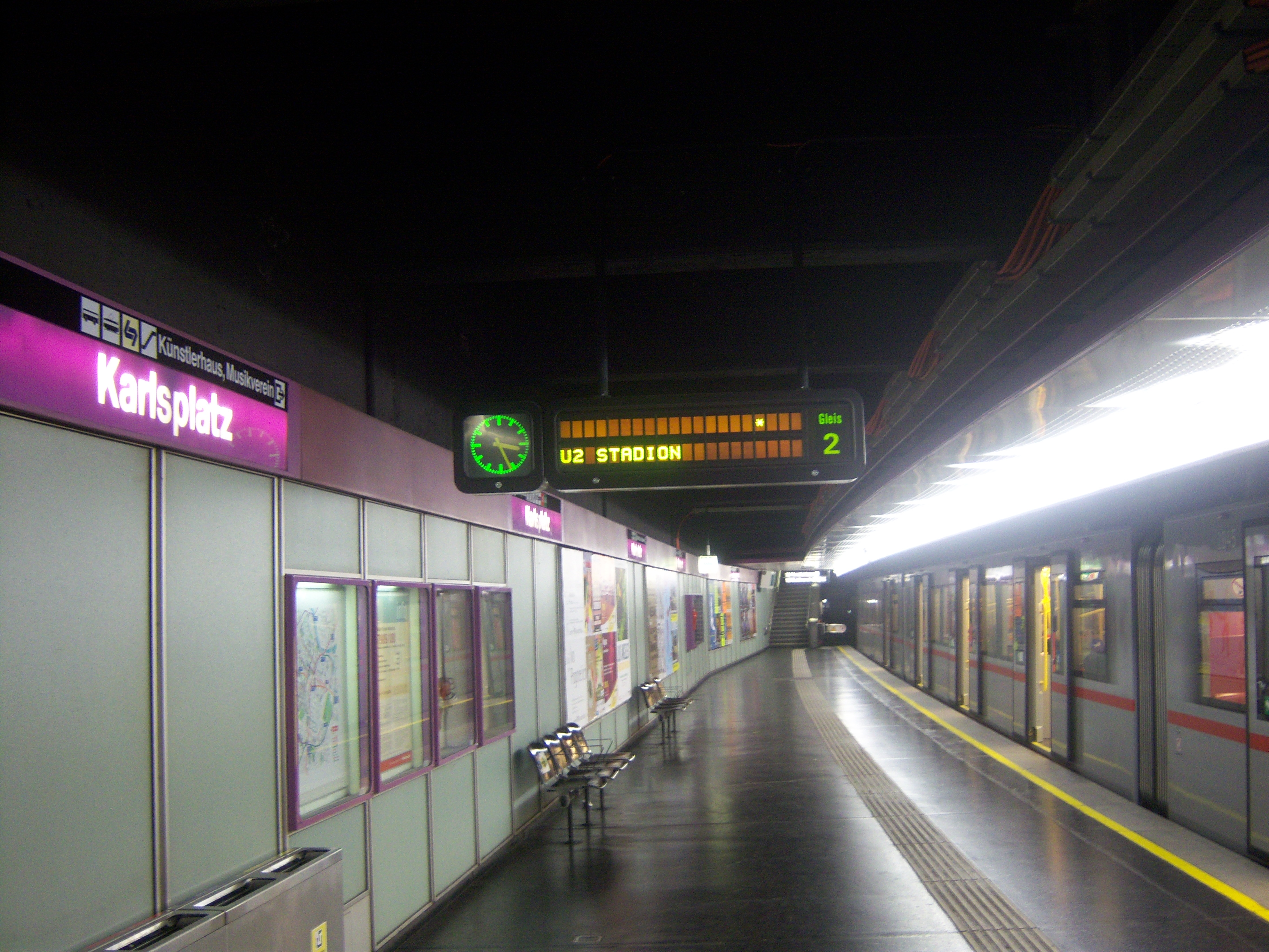 U2-Station Karlsplatz